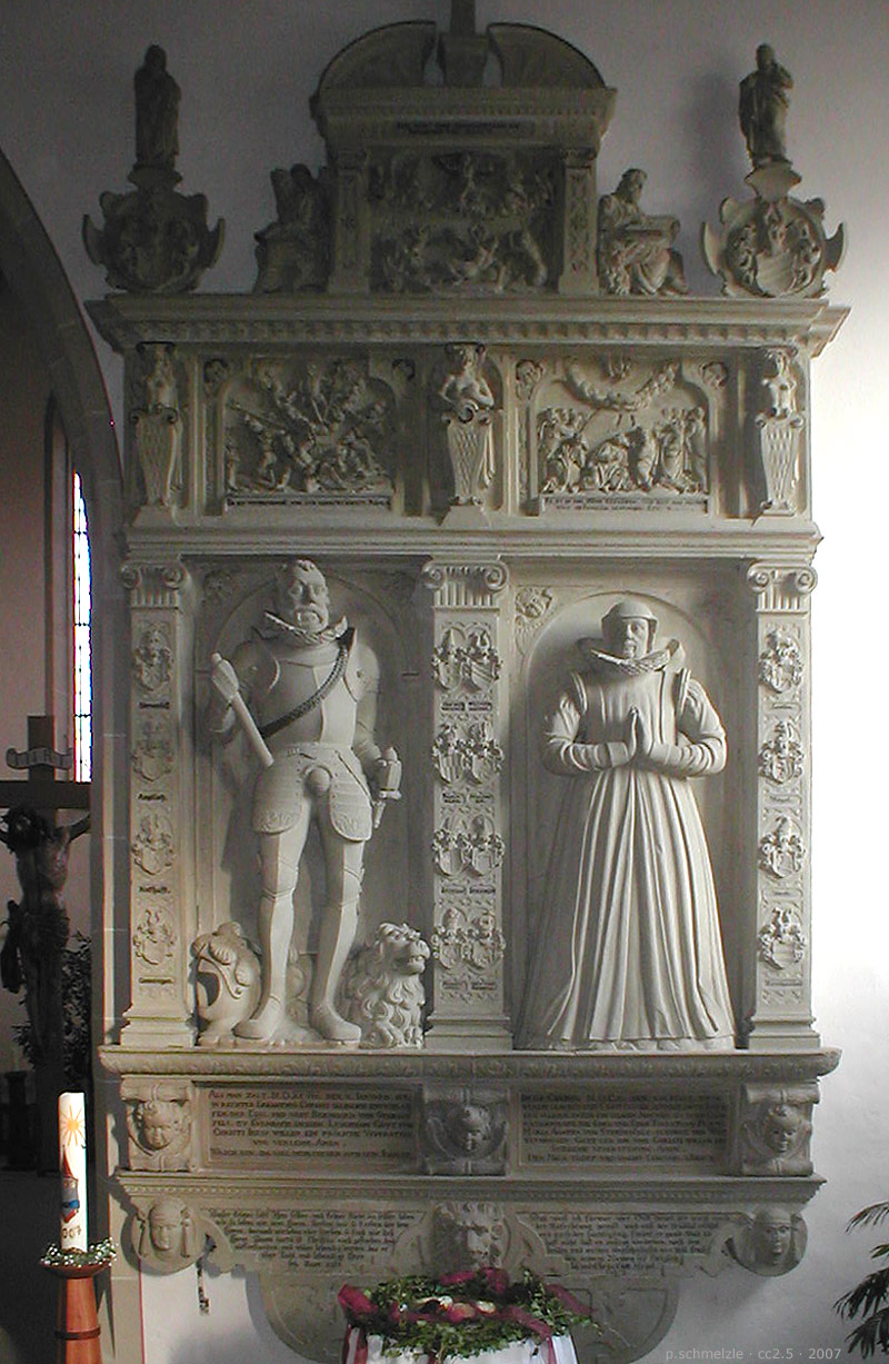 Sternenfels-Grabmal in der Evang. Michaelskirche in Kürnbach, Baden-Württemberg, Deutschland